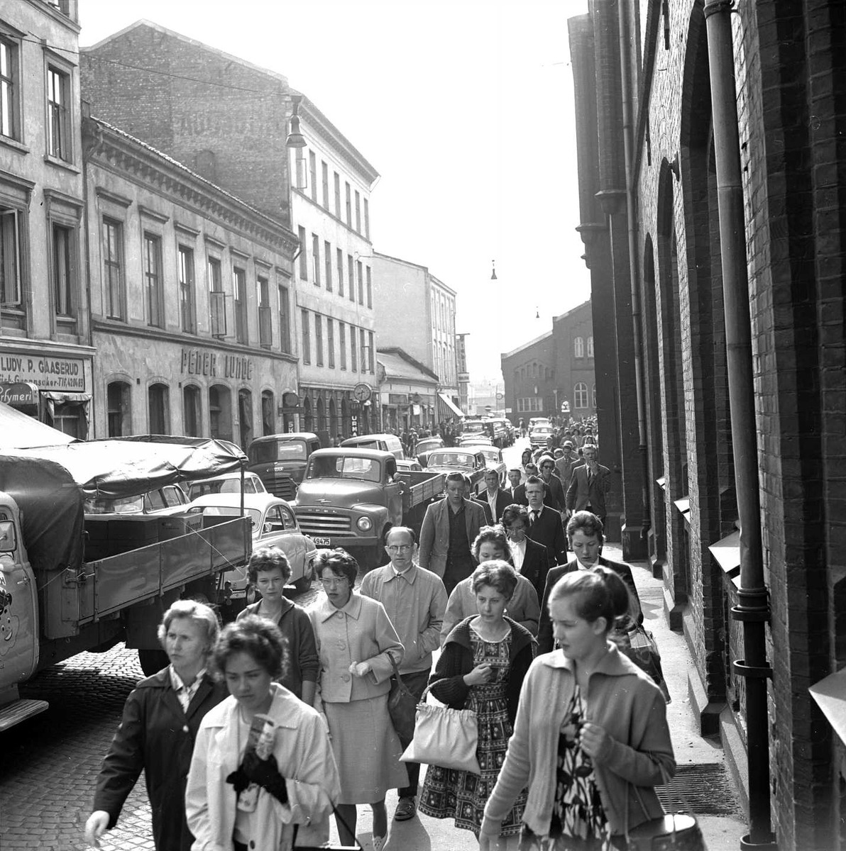 Morgentrafikk i Jernbanegata i Oslo, 1962.